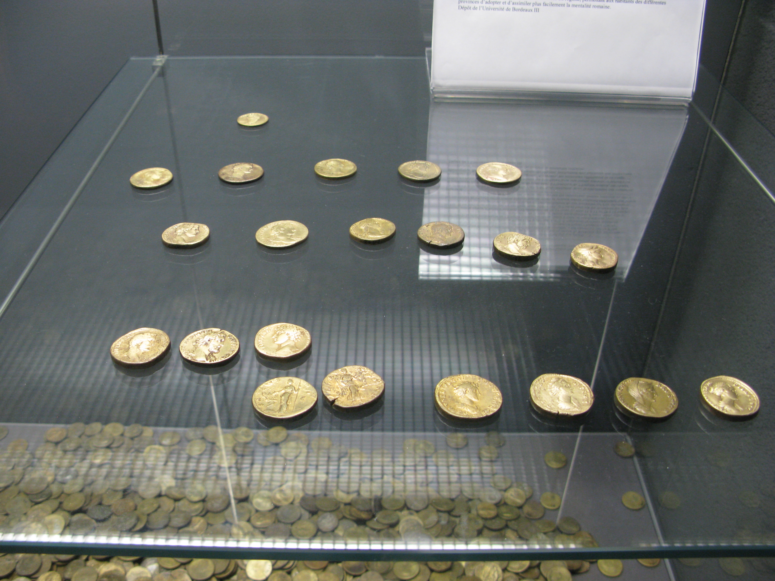 Trésor de Garonne, trouvé à Quinsac, Cadaujac et Camblanes-et-Meynac trouvé entre 1965 & 1970